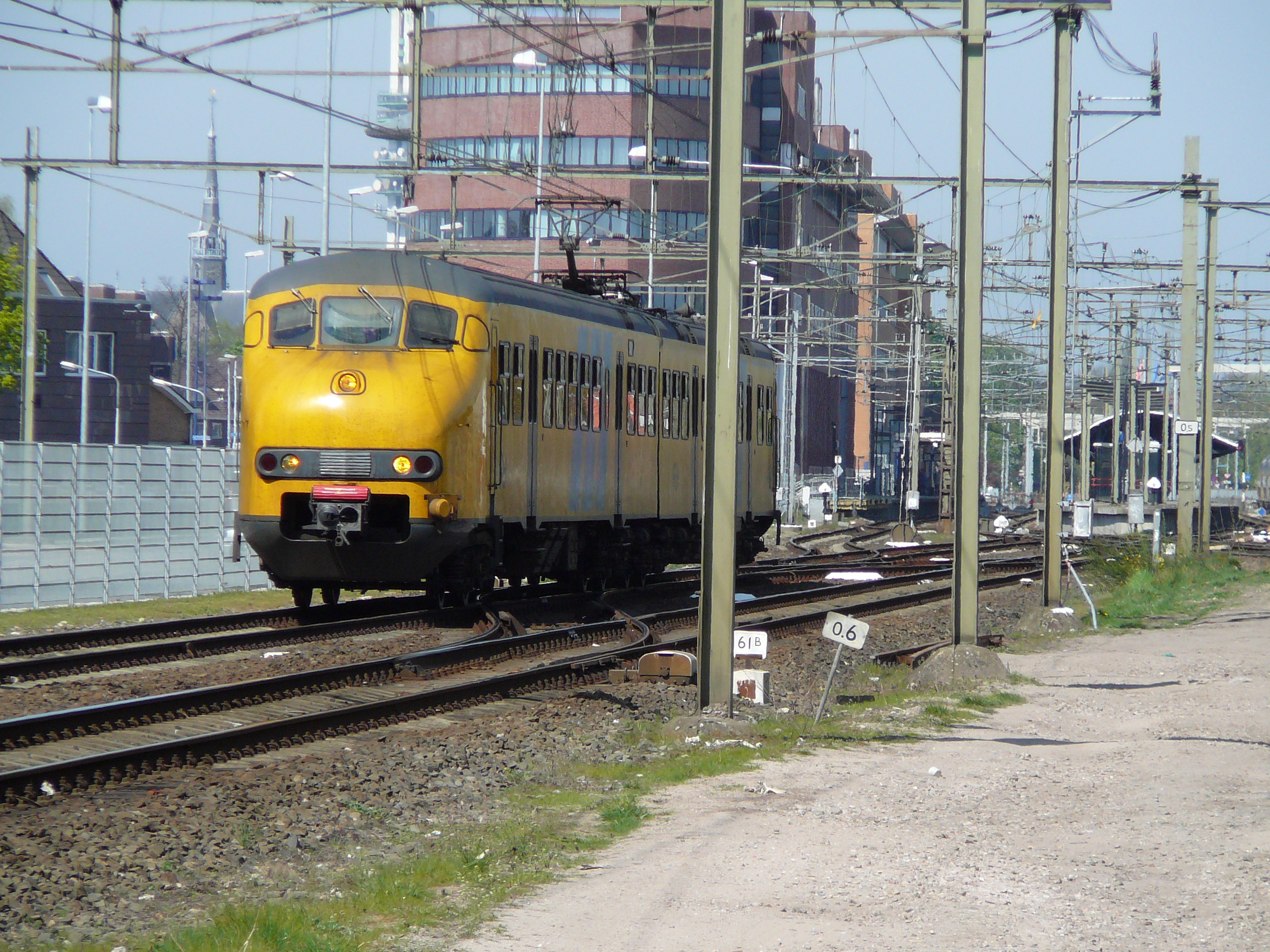 452 leeg richting Utrecht, Hilversum